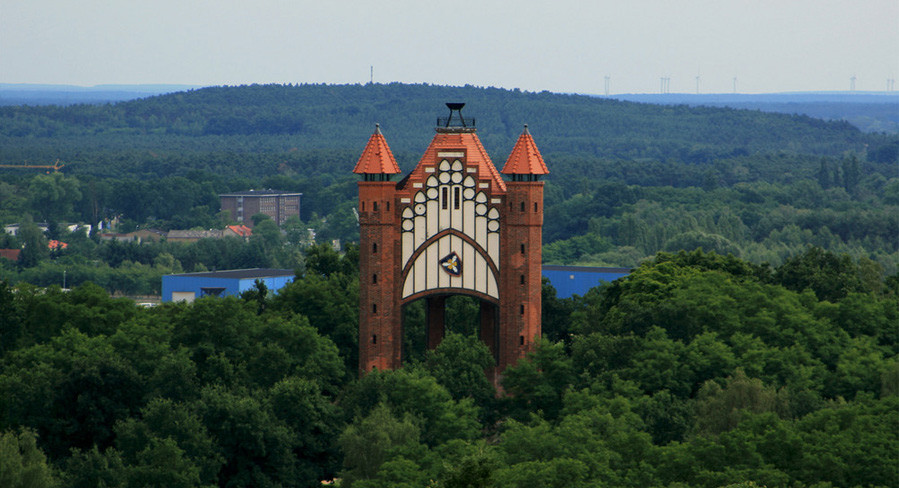 Bismarckturm in Rathenow aus der Luftperspektive